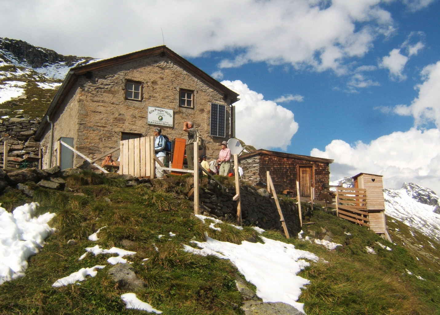 Die Alte Prager Hütte oberhalb des Innergschlöß, Österreich